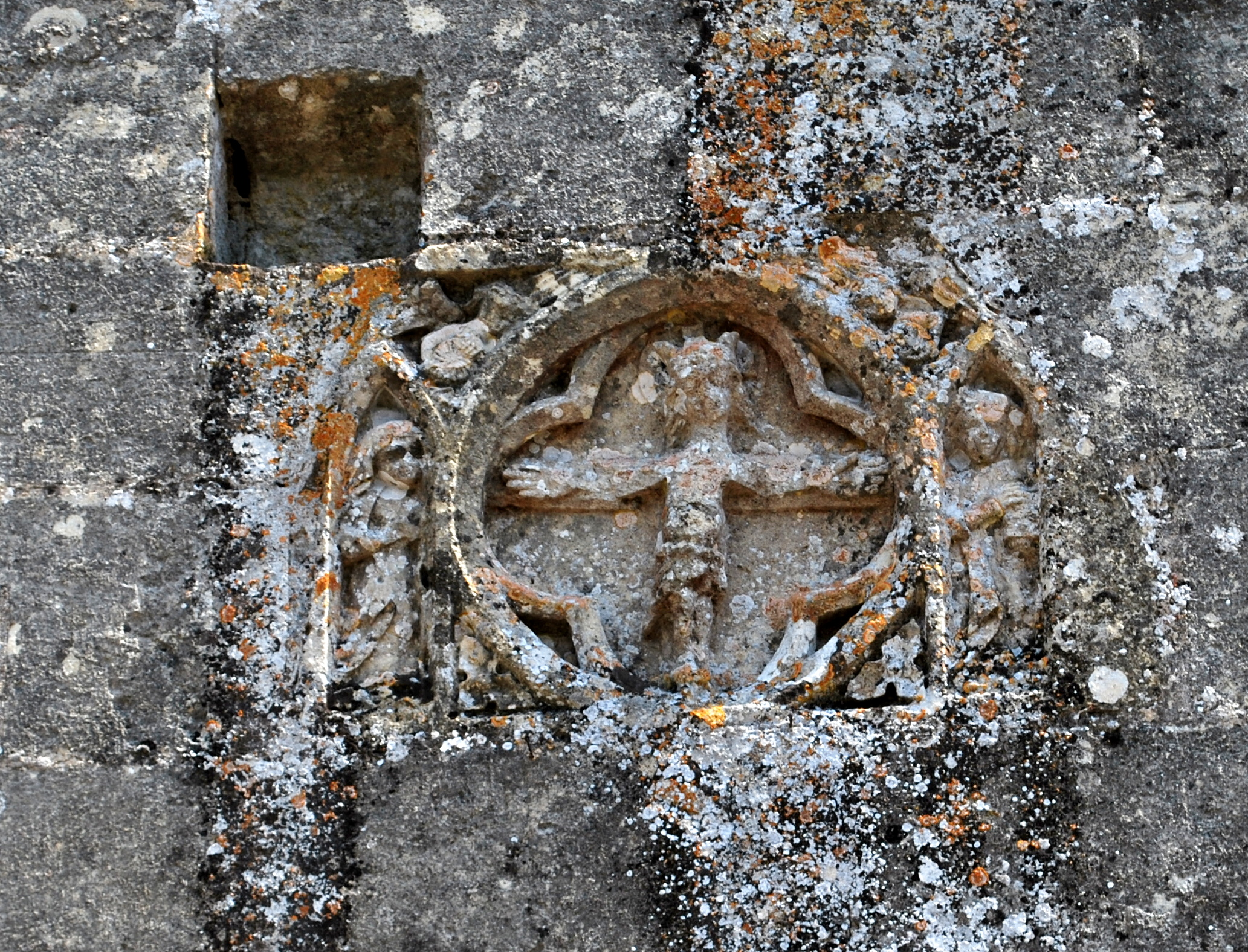 Bellebat église St Jacques